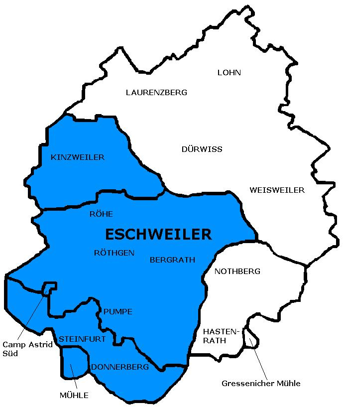 Ewentwicklung1800